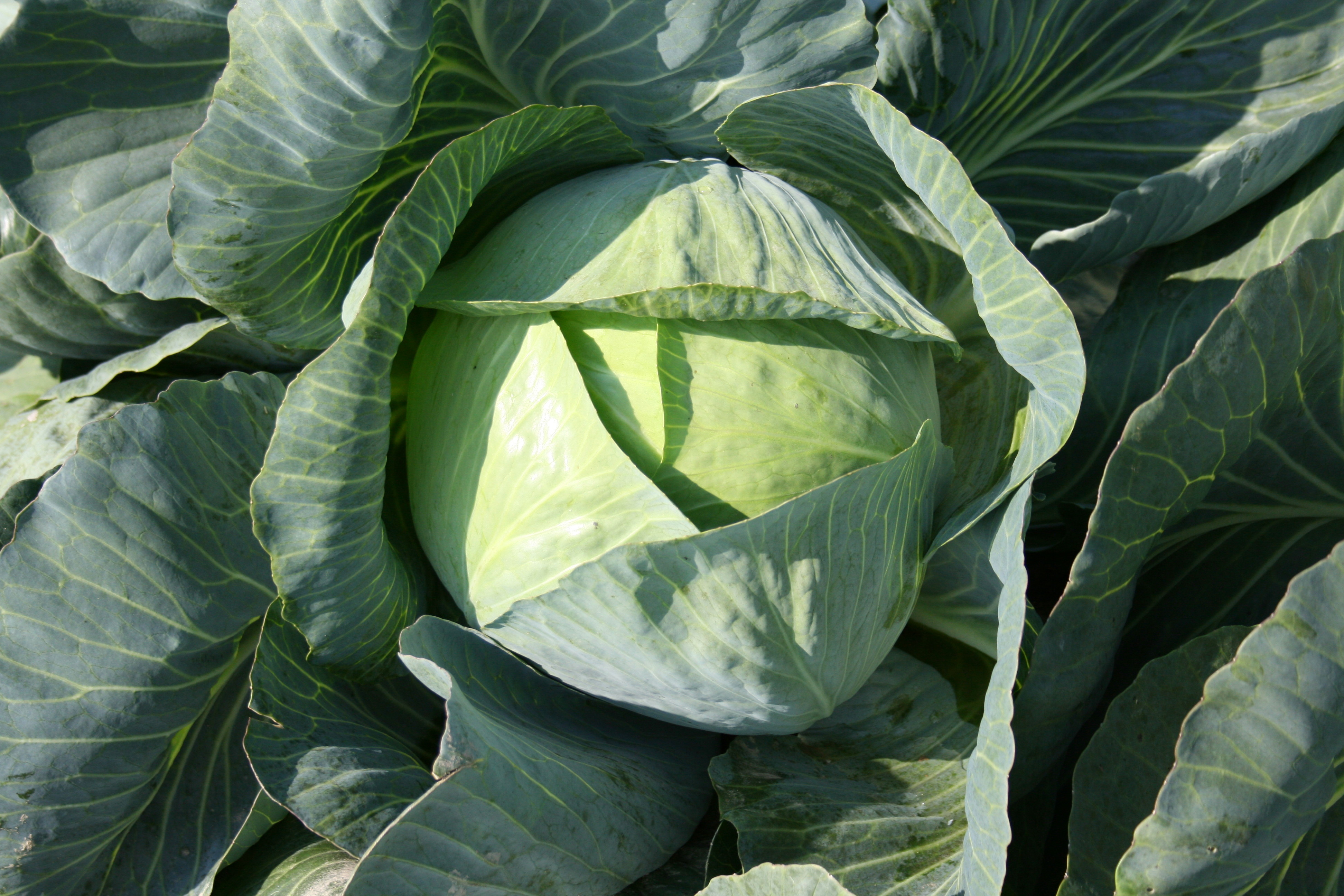 Weißkohl in Kalkar